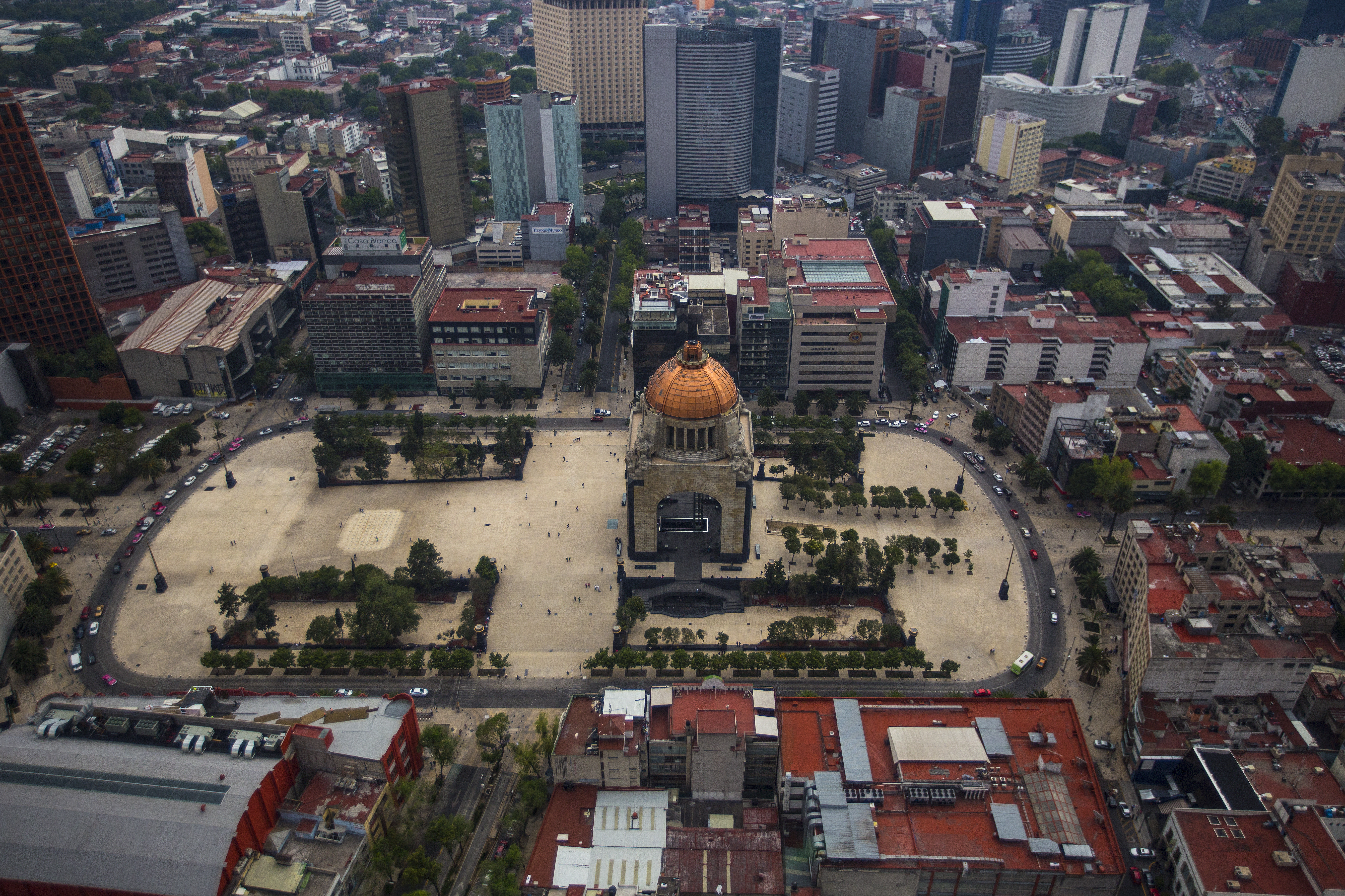 Fotografías de la Ciudad de México desde el aire.